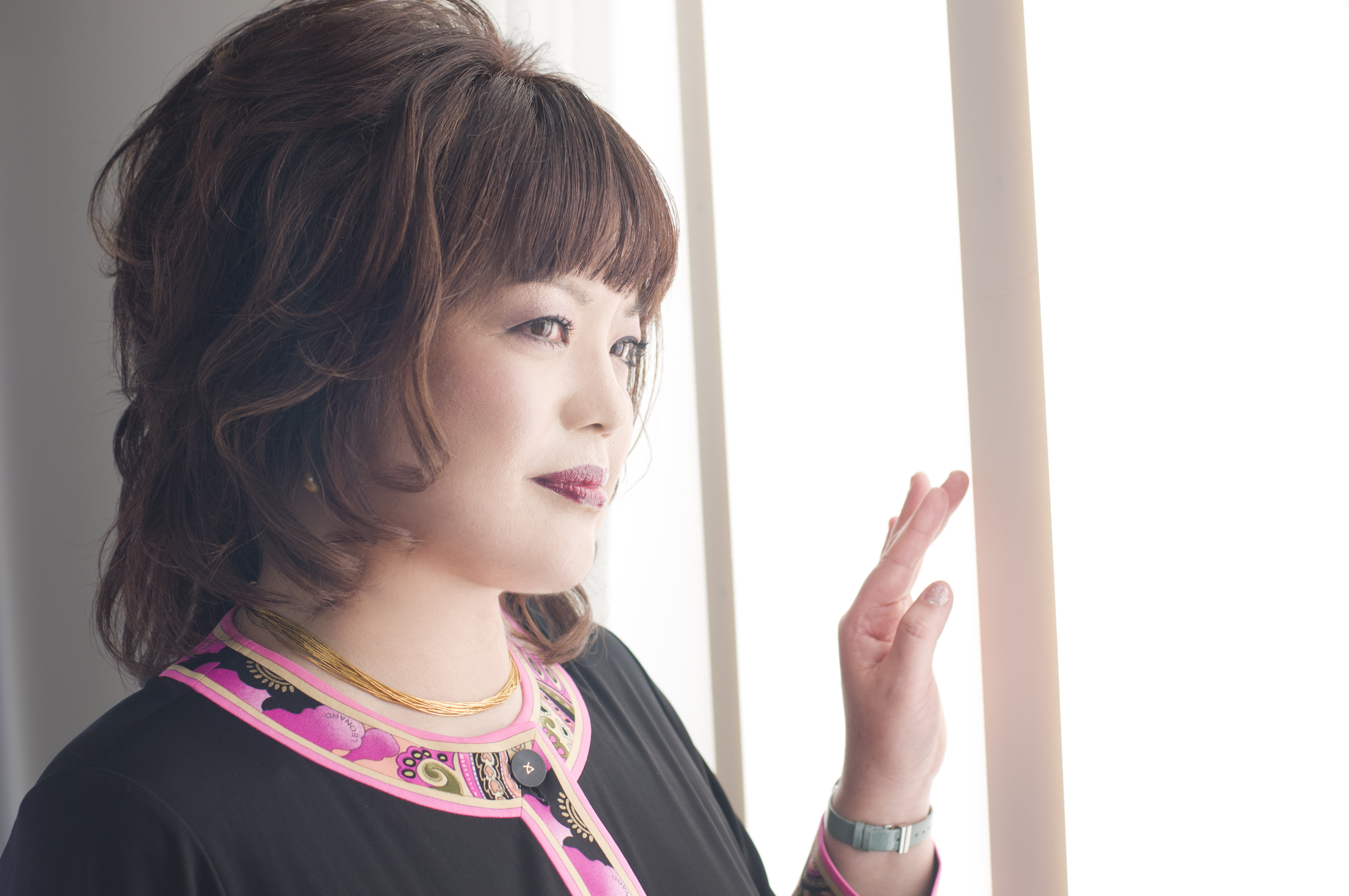 2013年現在の本人写真